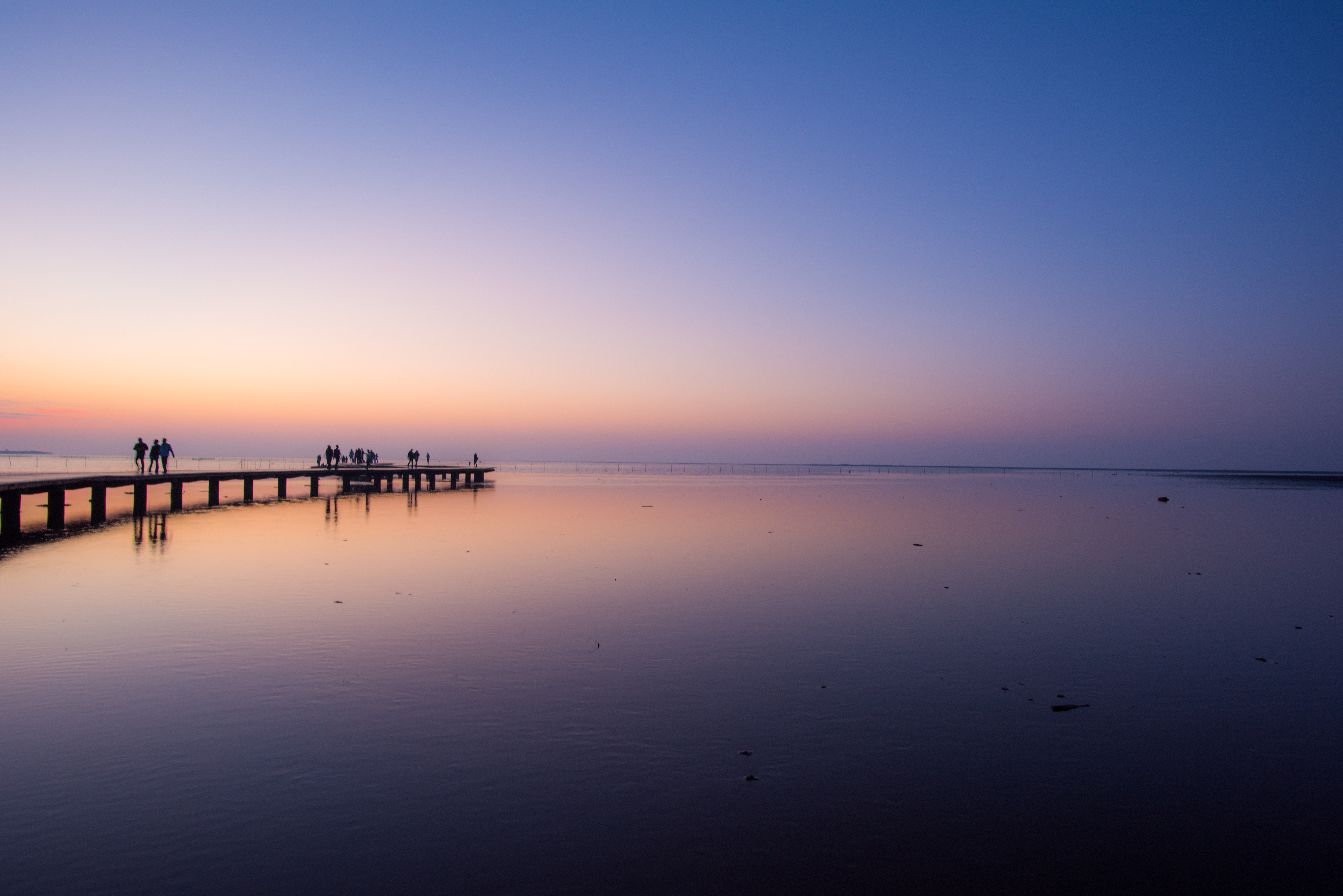 在日夜交替之際，人潮逐漸散去，屬於濕地生物們的歇息時刻